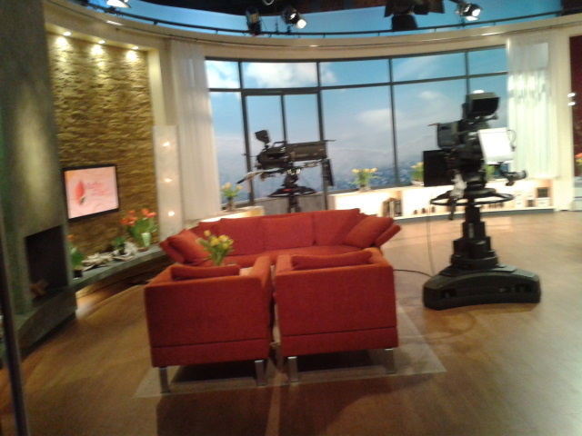 Drehstudio der TV-Serie Kaffee oder Tee in Baden-Baden im SWR-Gebäude